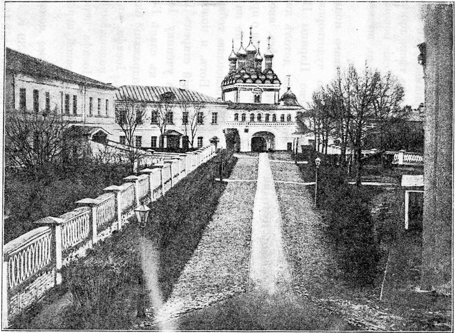 Иосифо-Волоцкий монастырь